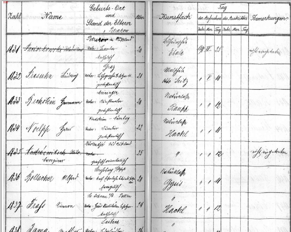 Photo du registre d'inscription pour l'année 1898